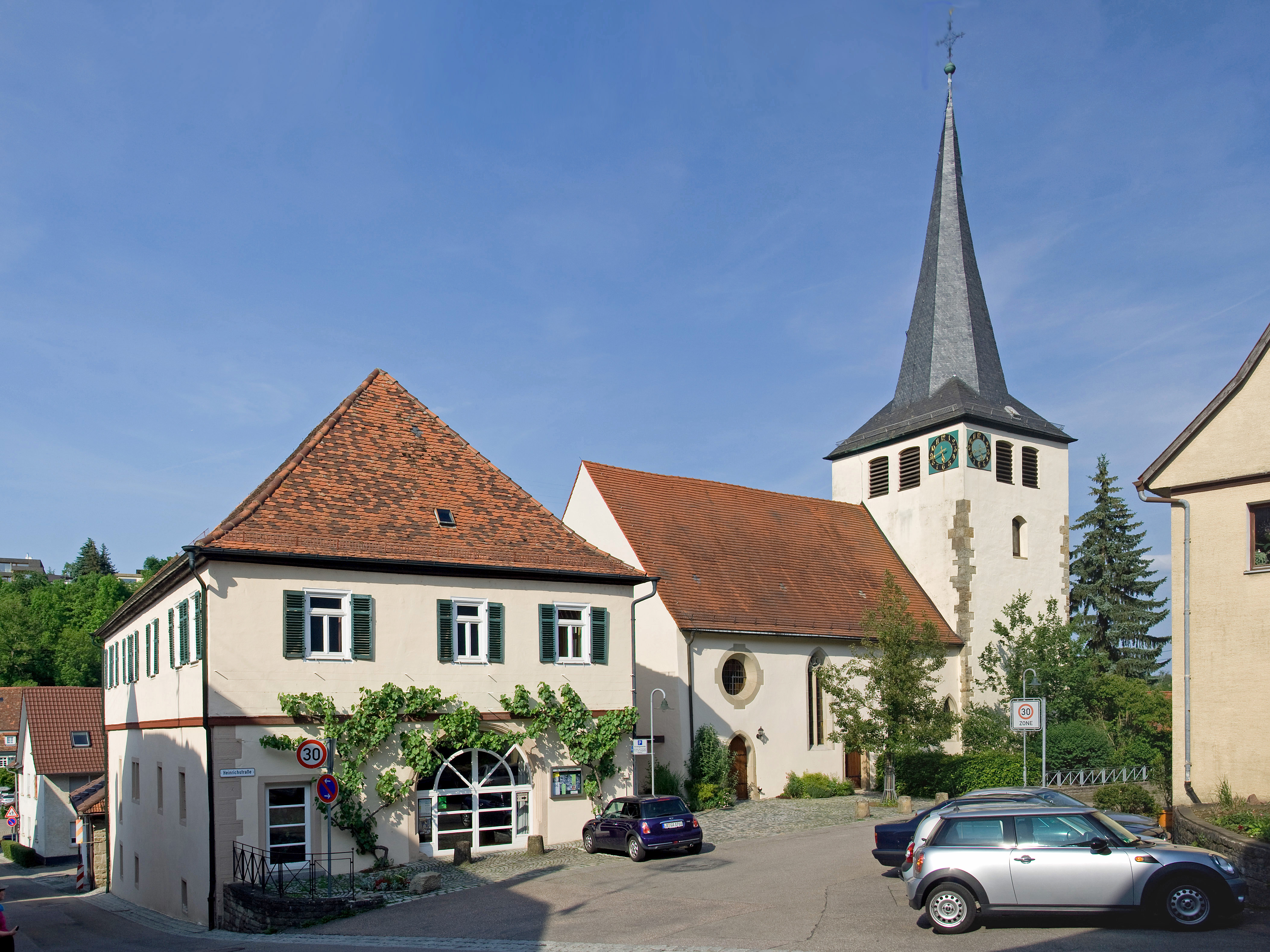 Denkmalgeschütztes Pfarrhaus und Kirche St.-Johannes in Aurich